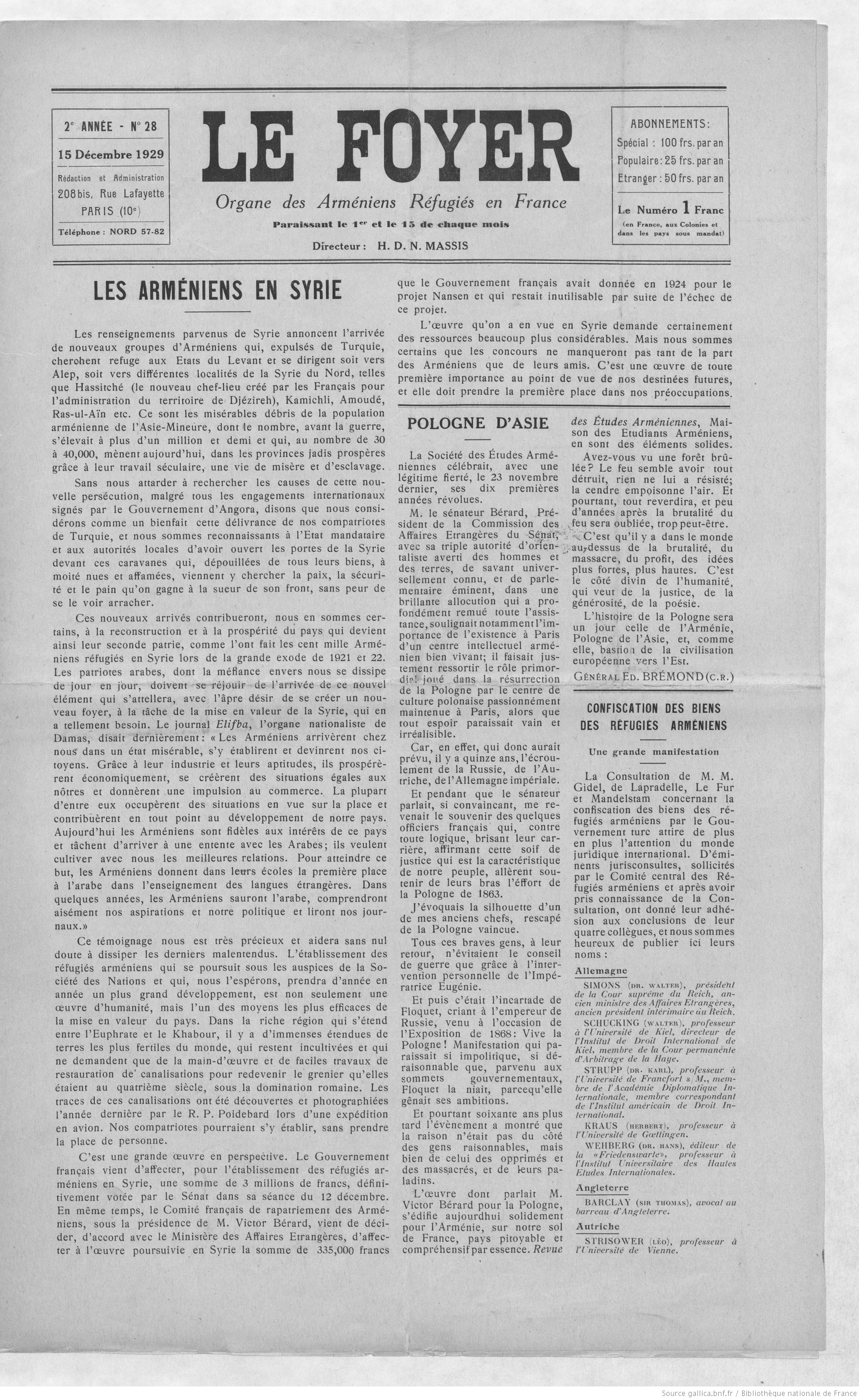 Le Foyer. Organe des Arméniens réfugiés en France["puis" Organe franco-arménien]